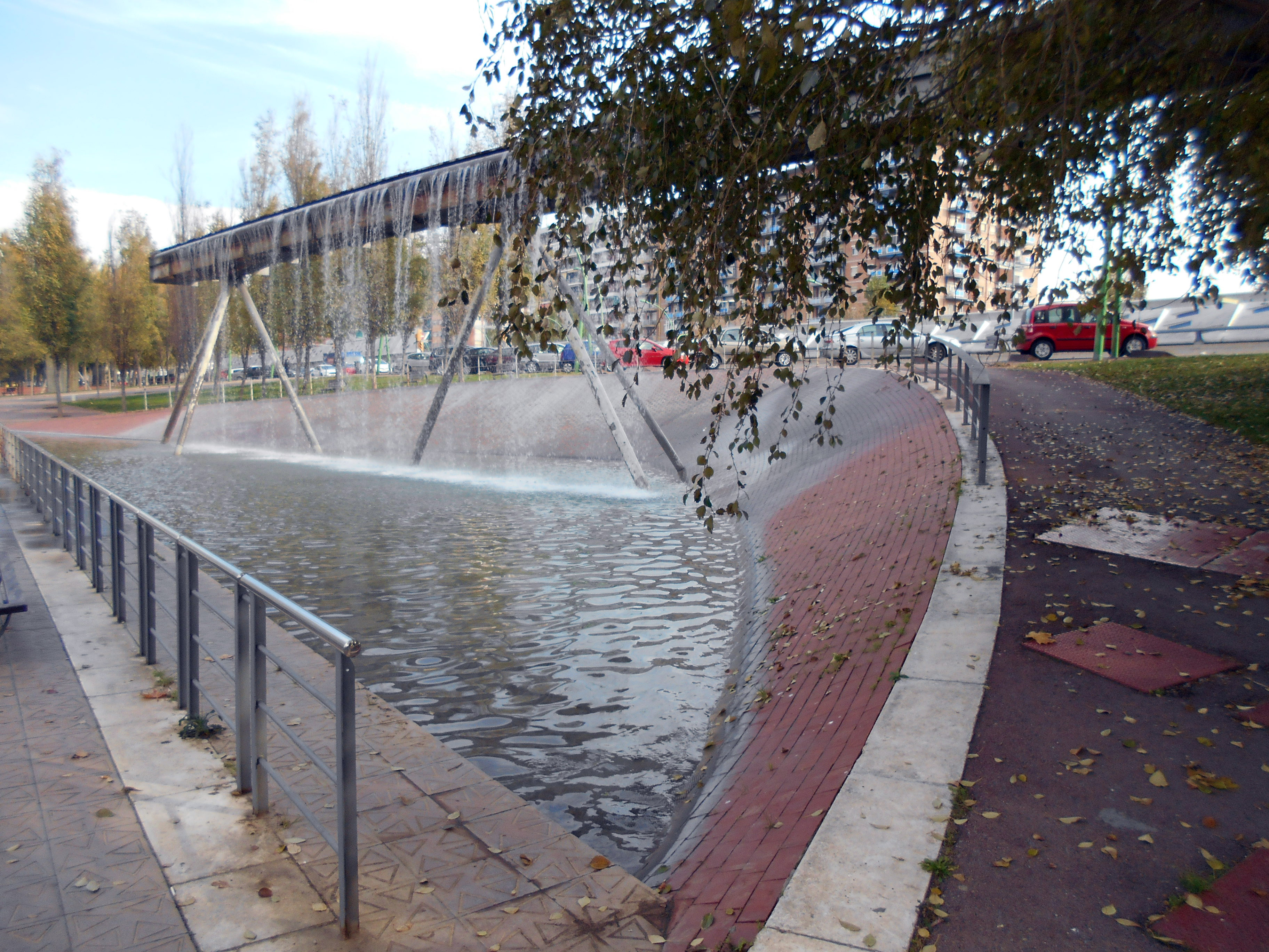 Parque lineal de la Gran Via